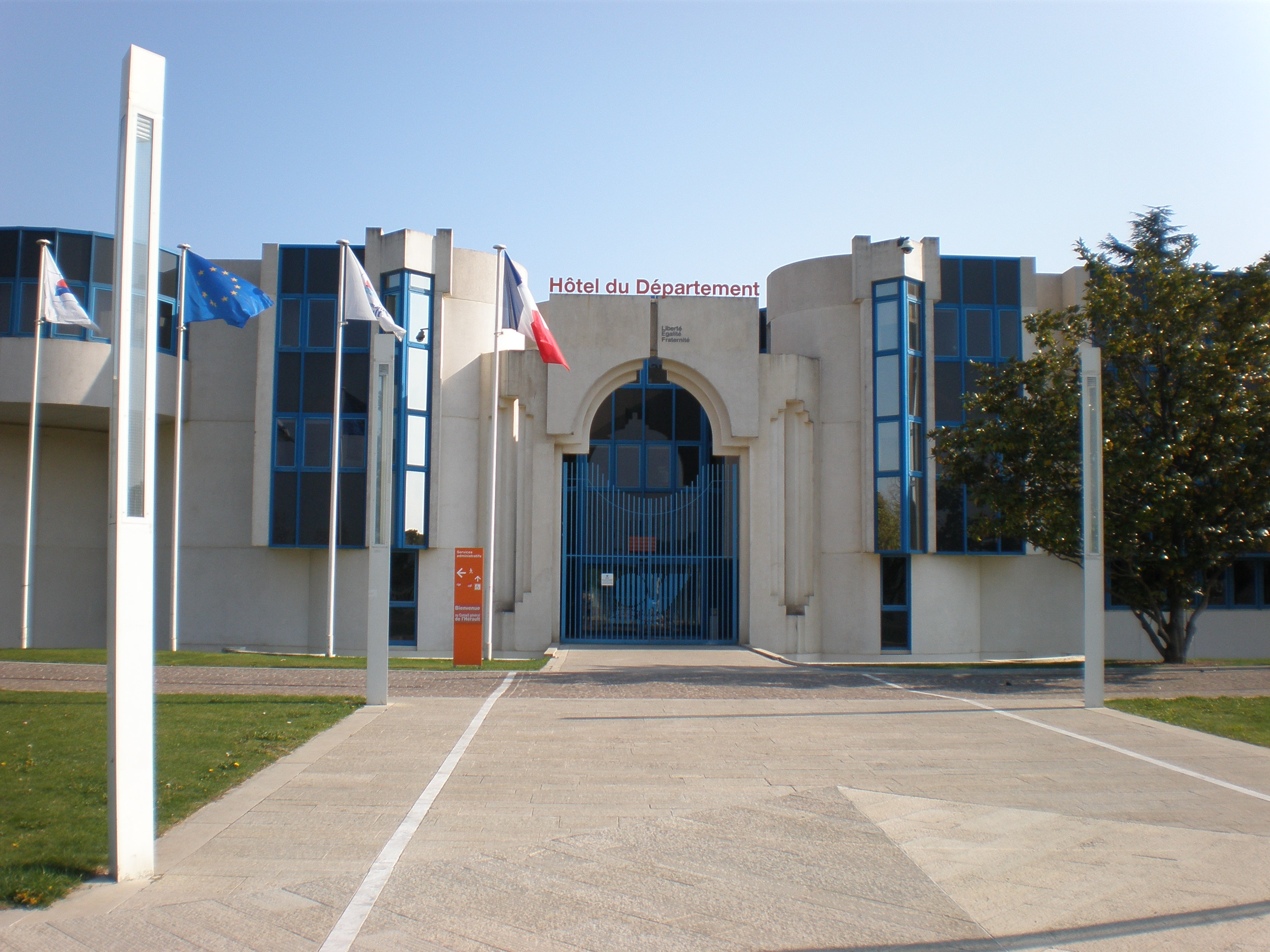 Entrée du Conseil Général de l'Hérault, Hôtel du département (Montpellier)